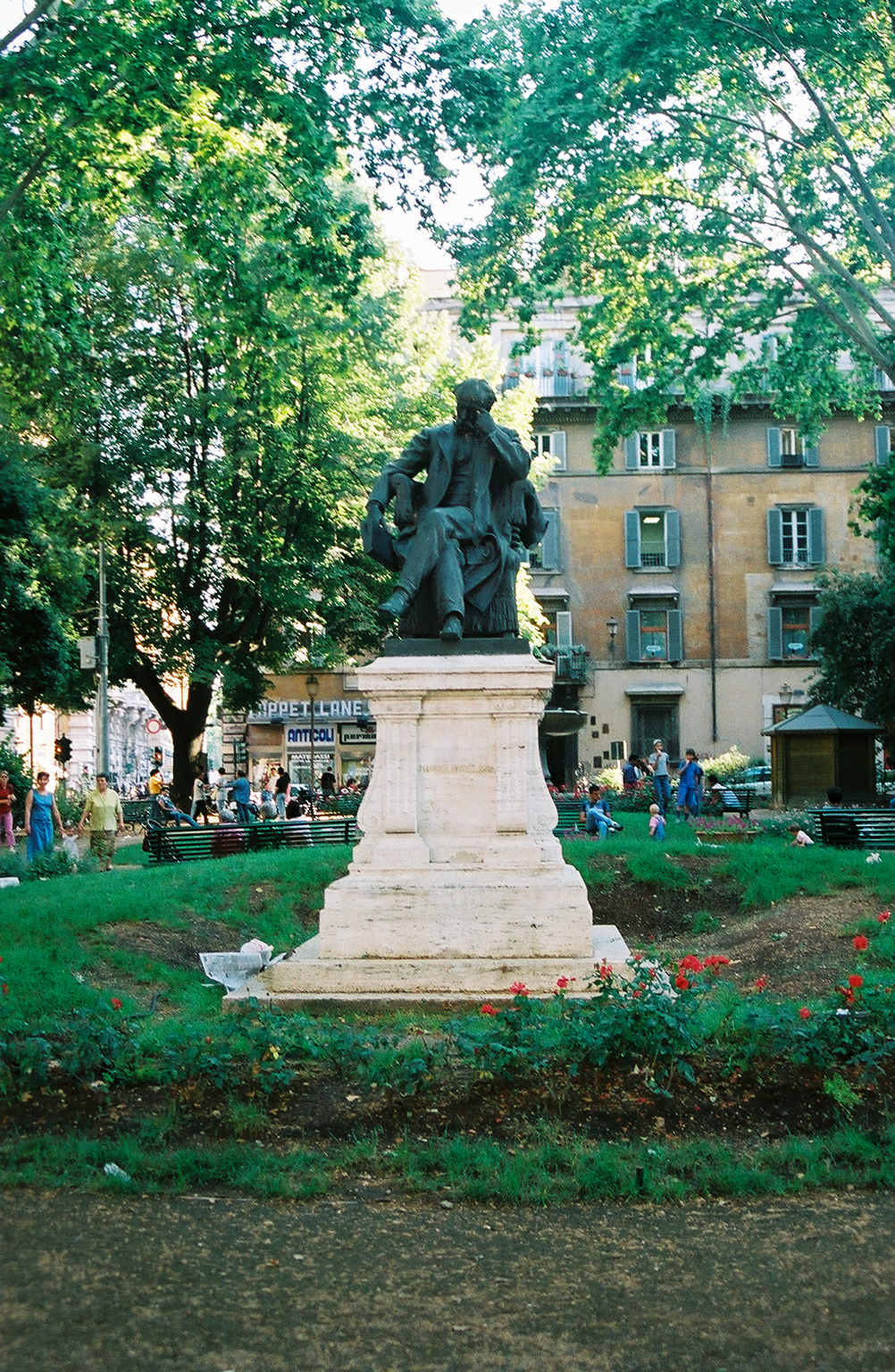 Roma, monumento a Federico Seismit-Doda (dello scultore Eugenio Maccagnani, 1905-1906), installato nei giardini di piazza Benedetto Cairoli nel marzo 1919.